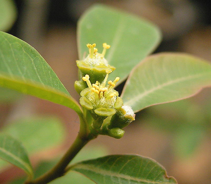 Euphorbia pervilleana BG Heidelberg, Germany